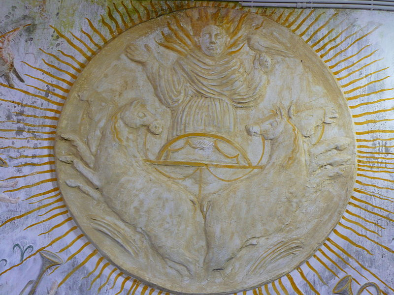 simbolo in pietra del sole collocato all' interno del "Tempio del Sole" ai Giardini La Mortella a Forio